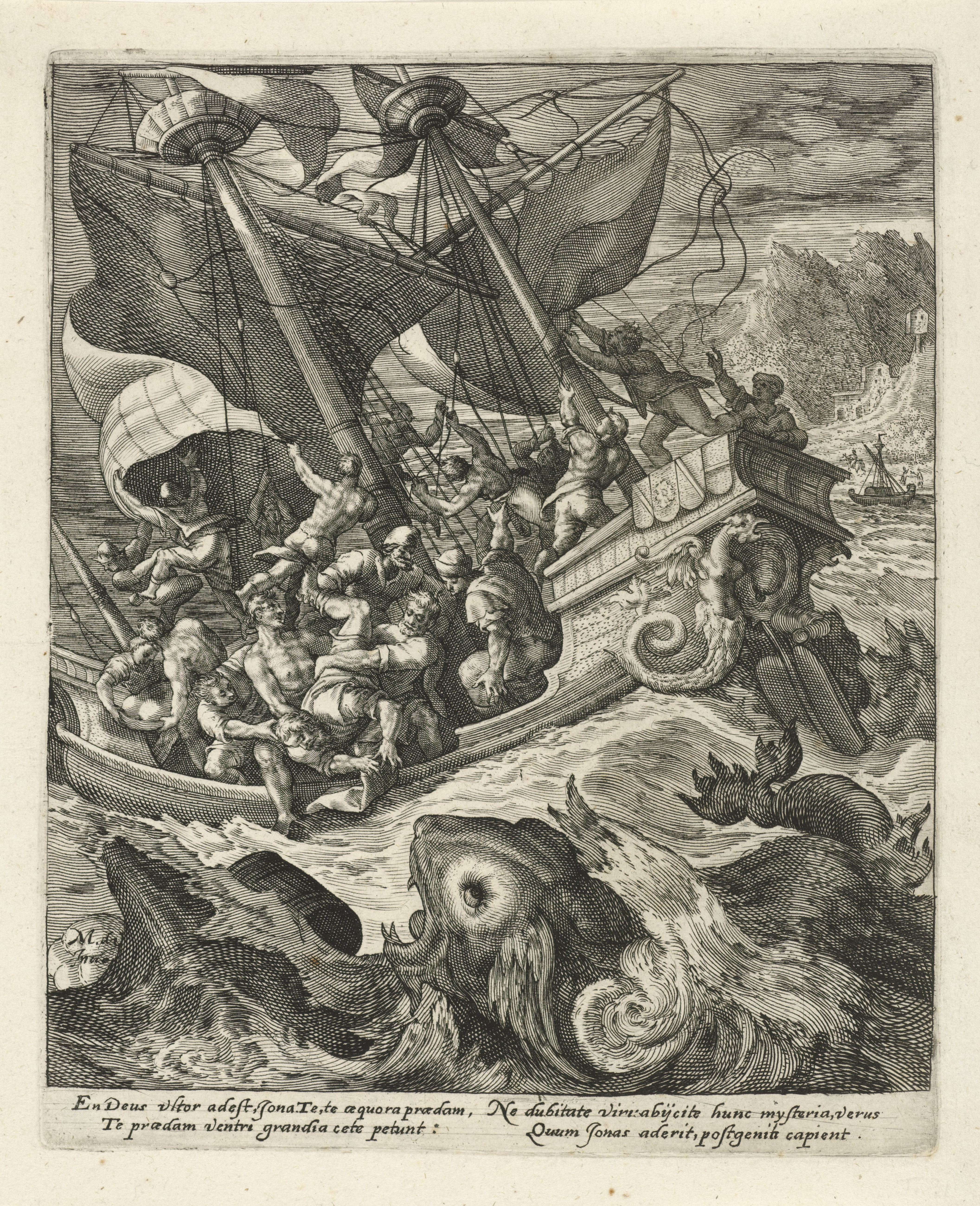 Crispin de Passe l'Ancien d'après Maarten de Vos, Jonas jeté par-dessus bord, estampe, Rijksmuseum, Amsterdam, inv. RP-P-1906-2057.